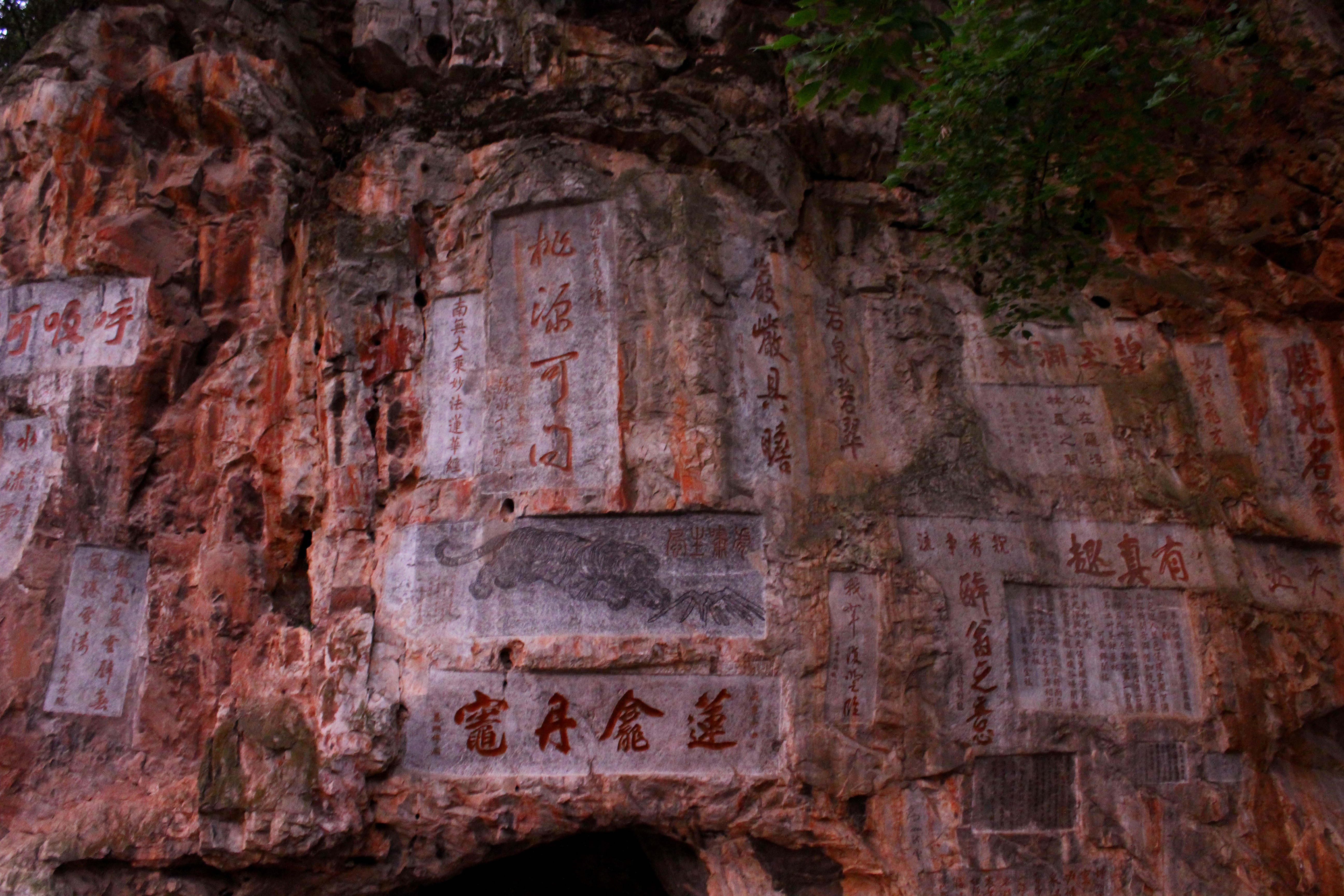 安宁温泉摩崖石刻群，“桃源可问”为清康熙庚午年(公元1690年)绣水于三贤题。于三贤：生卒年不详，辽宁锦县人，隶汉军镶黄旗。康熙二十九年(公元1690年)任云南布政使。其下的“虎啸声风”图为張善子所绘。